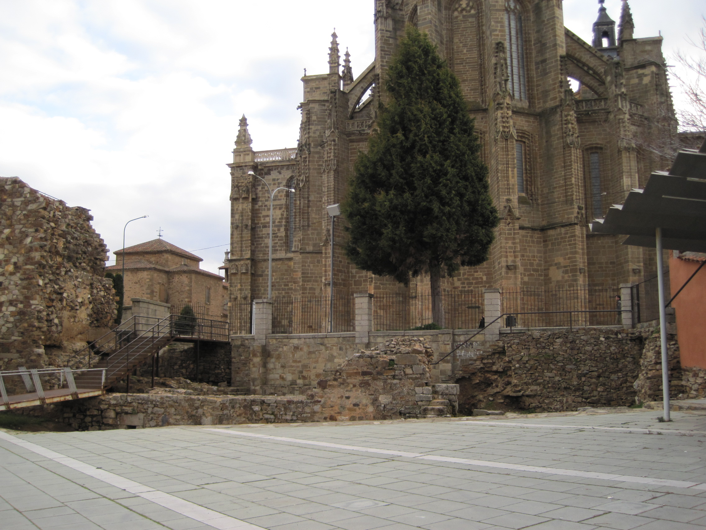 Brecha en la muralla de Astorga (León, España).